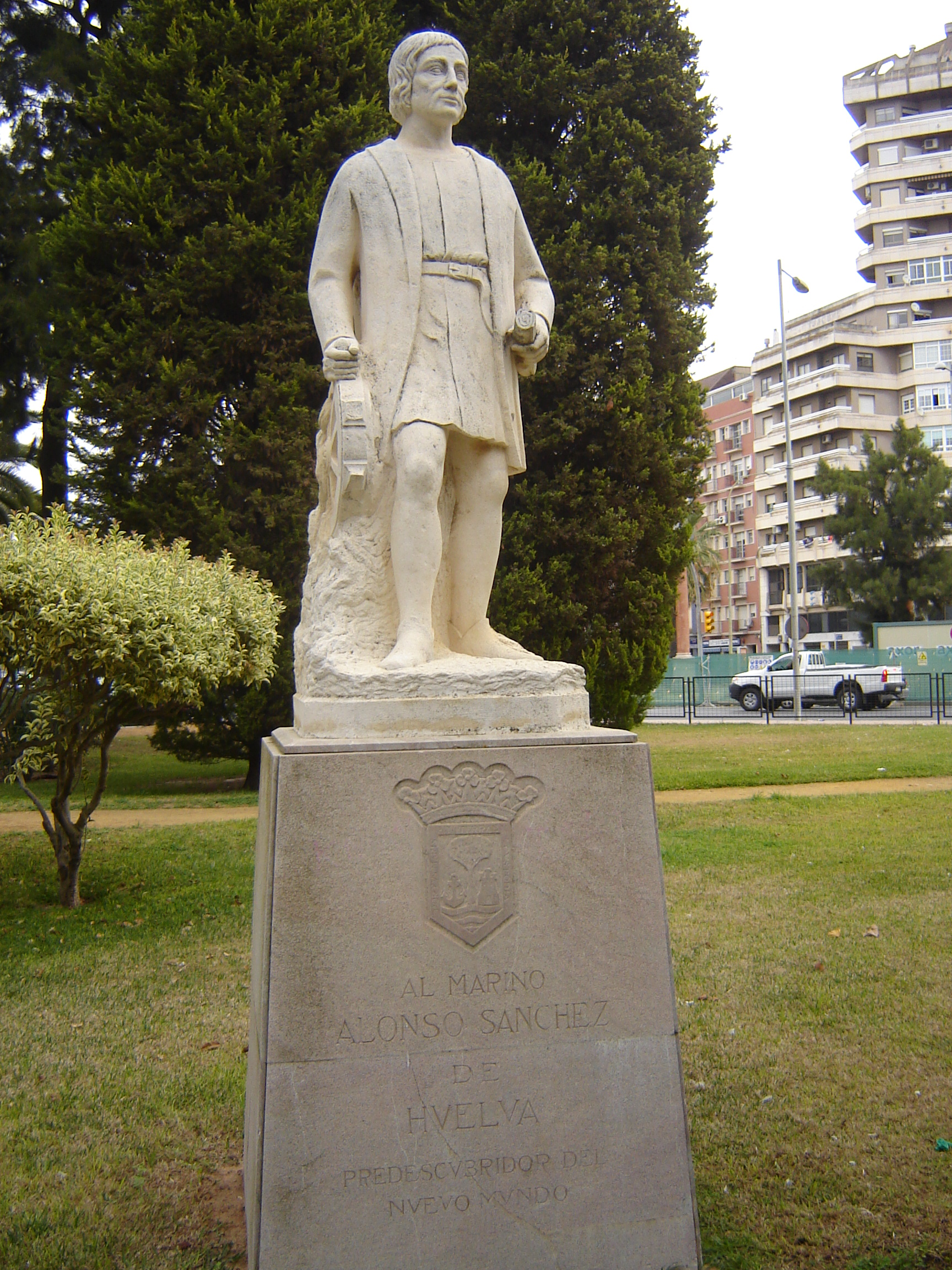 imagen de Alonso Sánchez de Huelva, predescubridor de nuevo mundo.